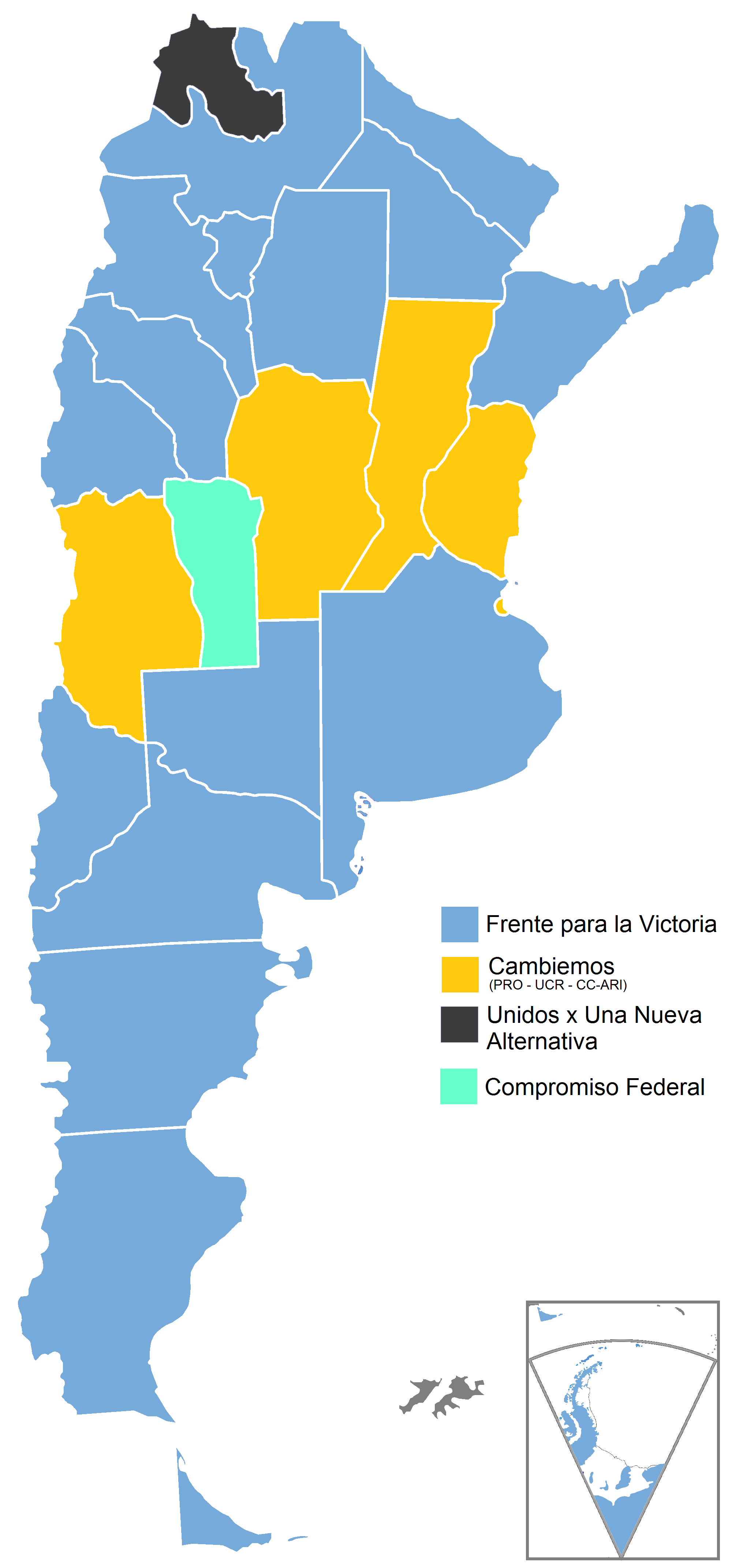 Mapa de las elecciones generales argentinas 2015